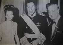 El Presidente Peron y la Vicepresidente Estela M. de Peron con el embajador en España Dr. Jose Campano en el teatro Colon de Bs As 1974